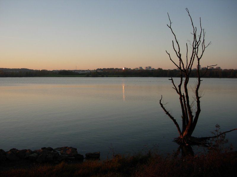 Lac de Maine à Angers (Maine-et-Loire, France).